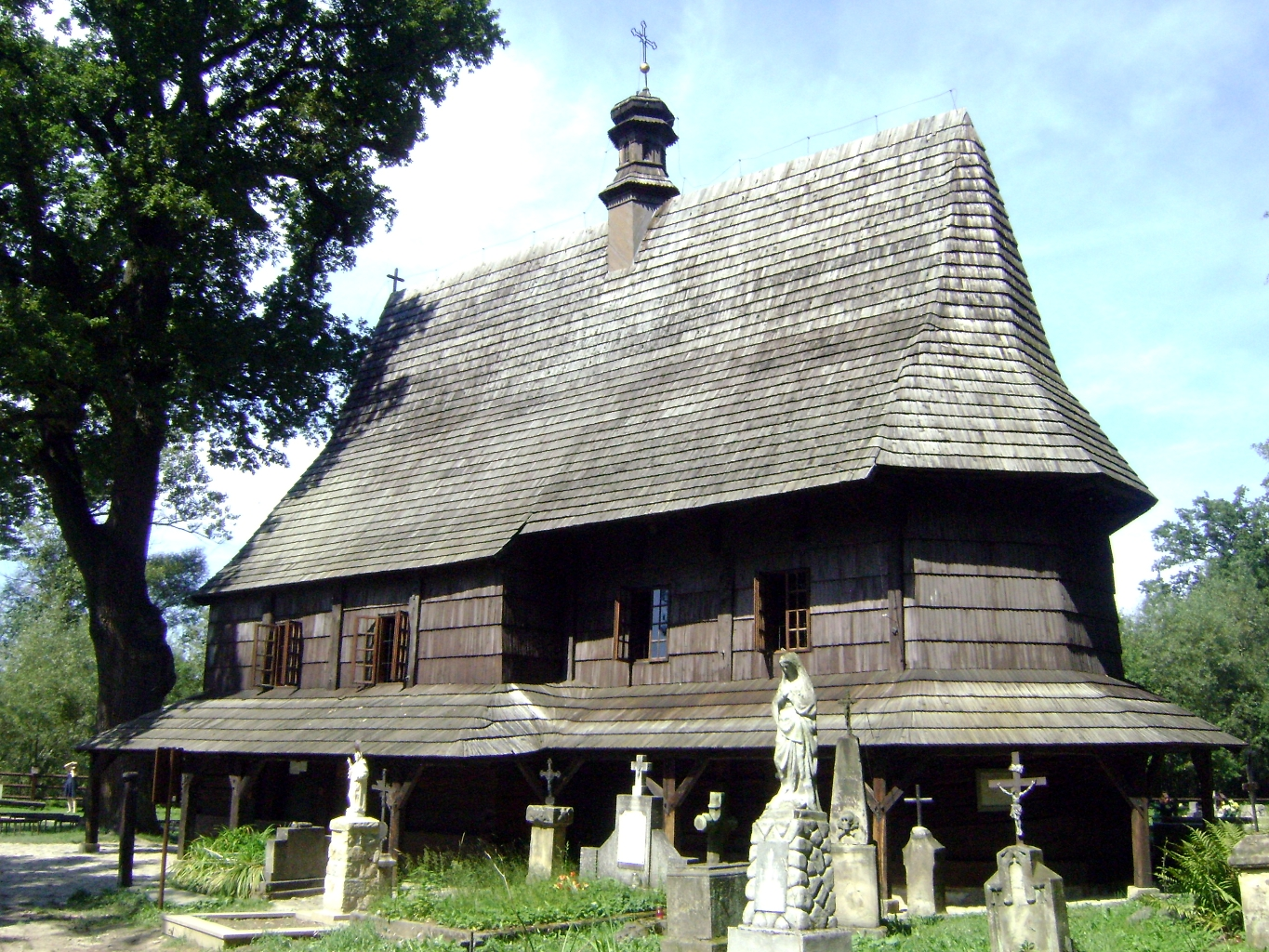 Lipnica Murowana - rzymskokatolicki kościół cmentarny p.w. św. Leonarda, kon. XV